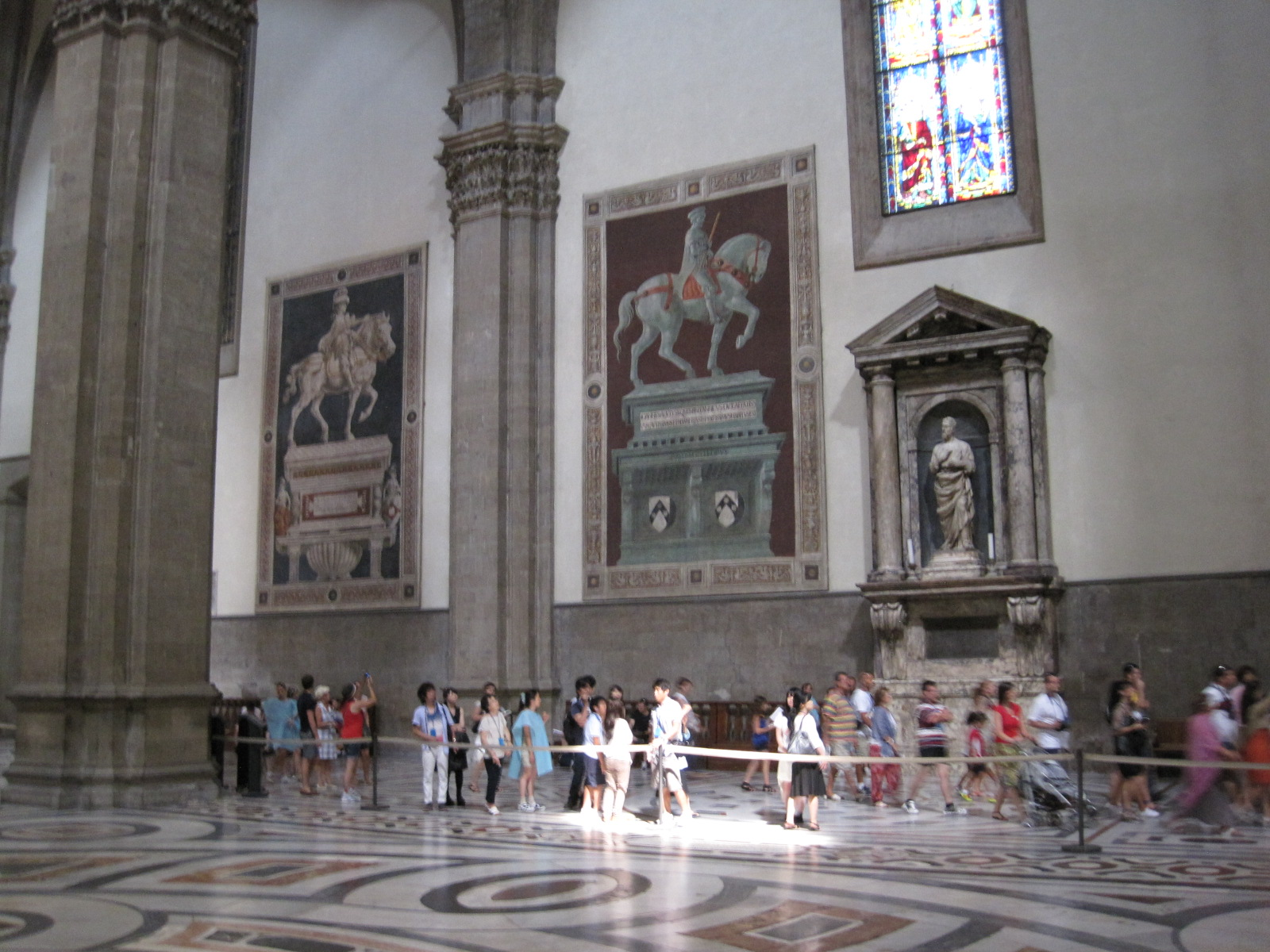 Interior of Santa Maria del Fiore (Florence)